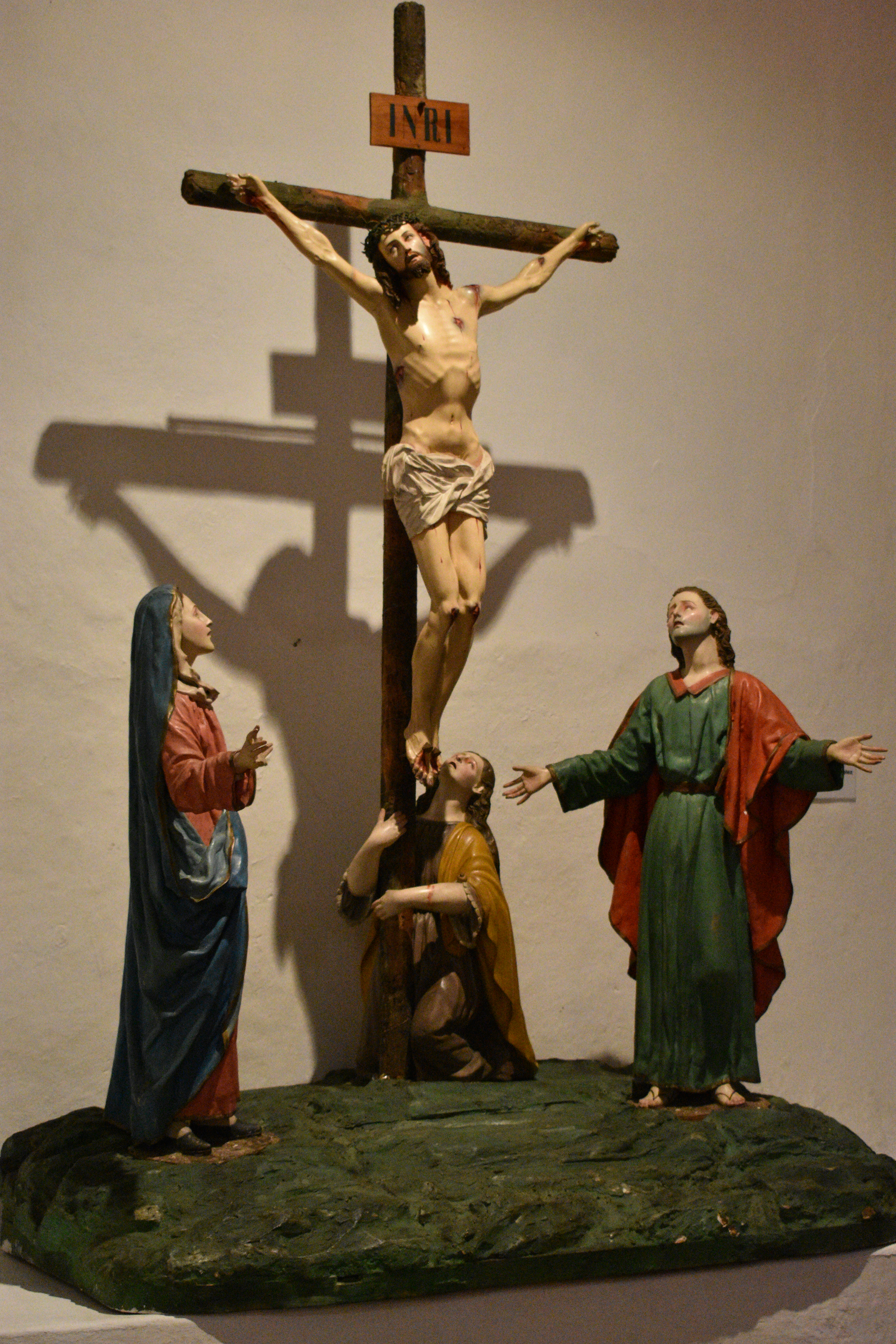 Materiales: Madera encarnada y policromada